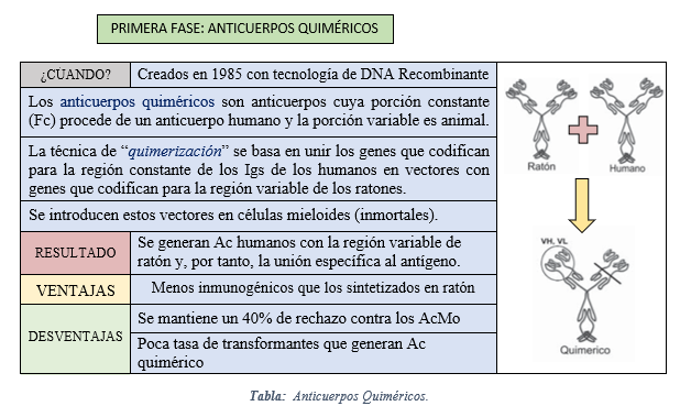 Anticuerpos Quiméricos y su uso en el desarrollo de Anticuerpos Monoclonales.